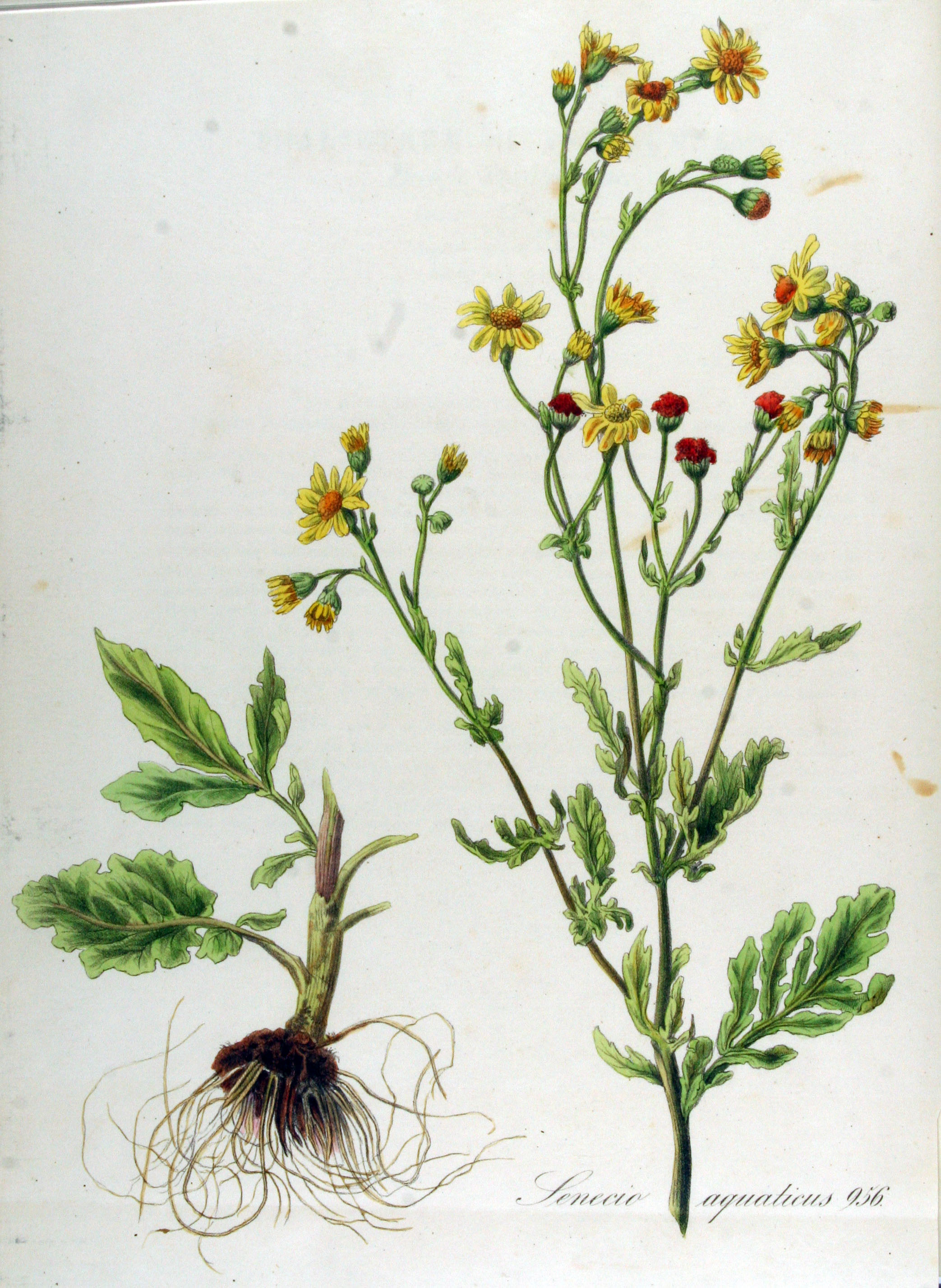 Jacobaea aquatica (Hill) G. Gaertn., B. Mey. & Scherb. (Syn. Senecio aquaticus Hill)